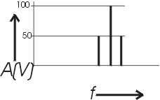 Spectrum overzicht AM met amplitude